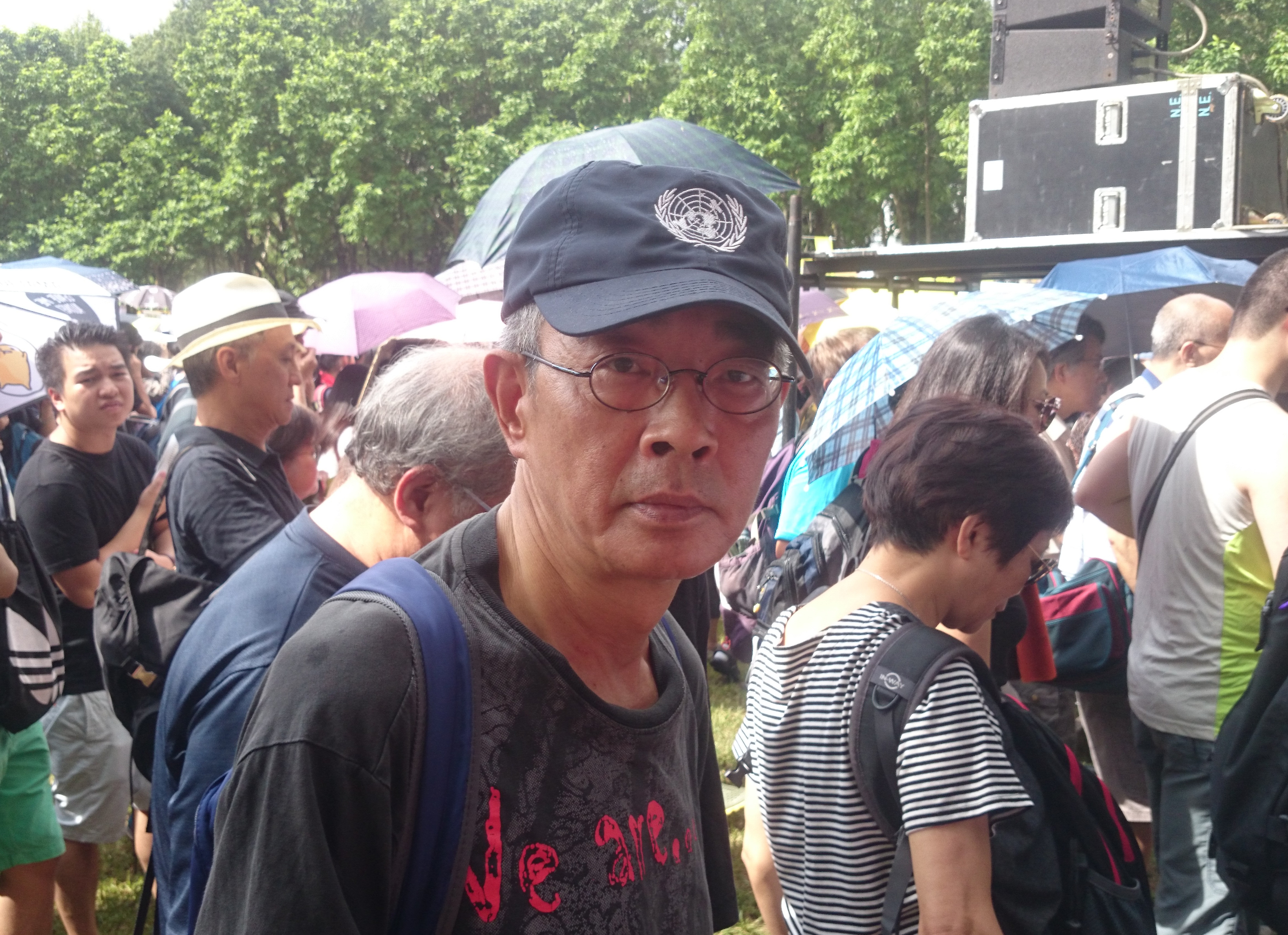 粵語: 林榮基企咗喺維多利亞公園度。